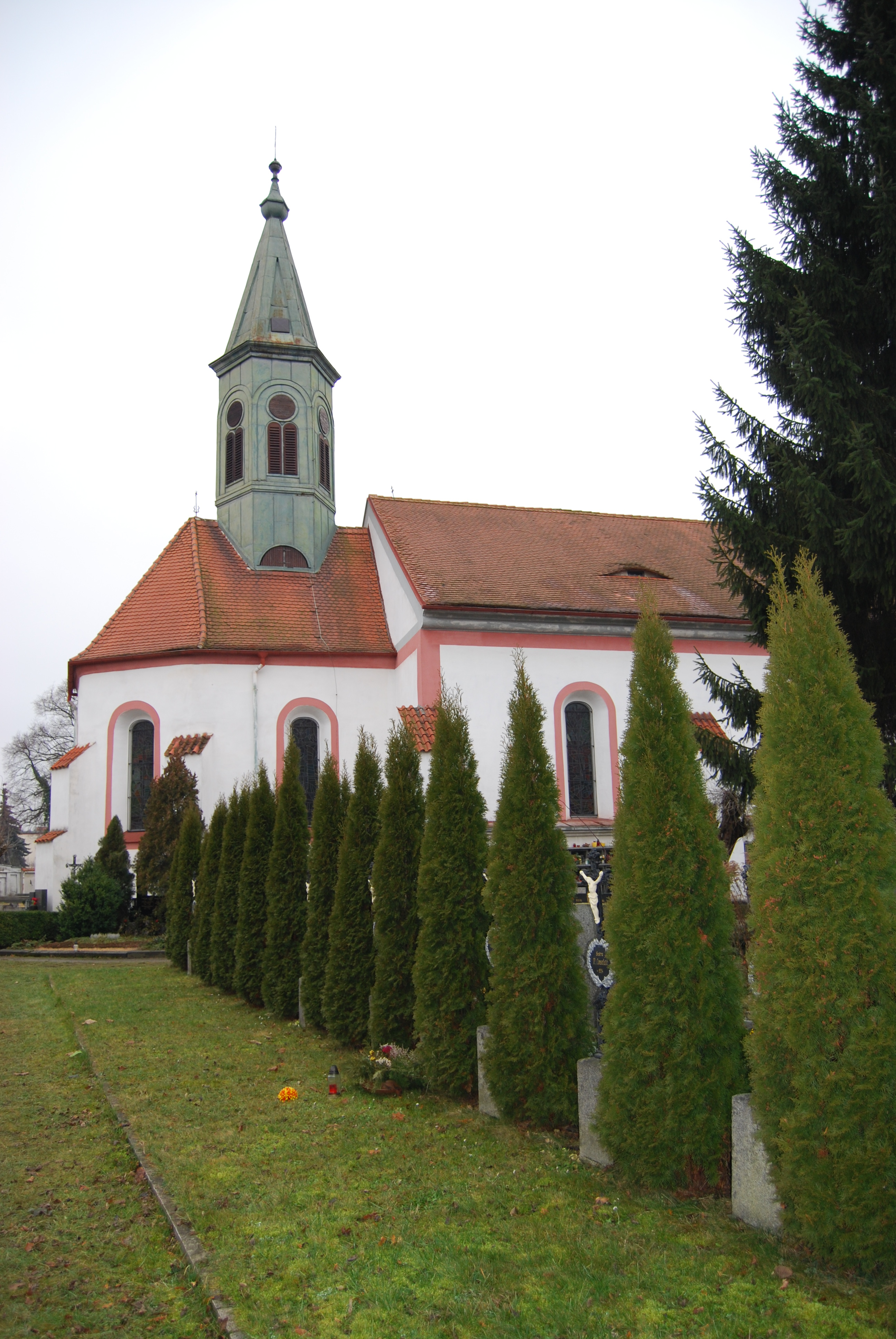 Hřbitovní kostel sv. Jana Křtitele. Pohled z místního hřbitova. Horažďovice v západních Čechách. Okres Klatovy. Česká republika. - Google Maps - Google Earth